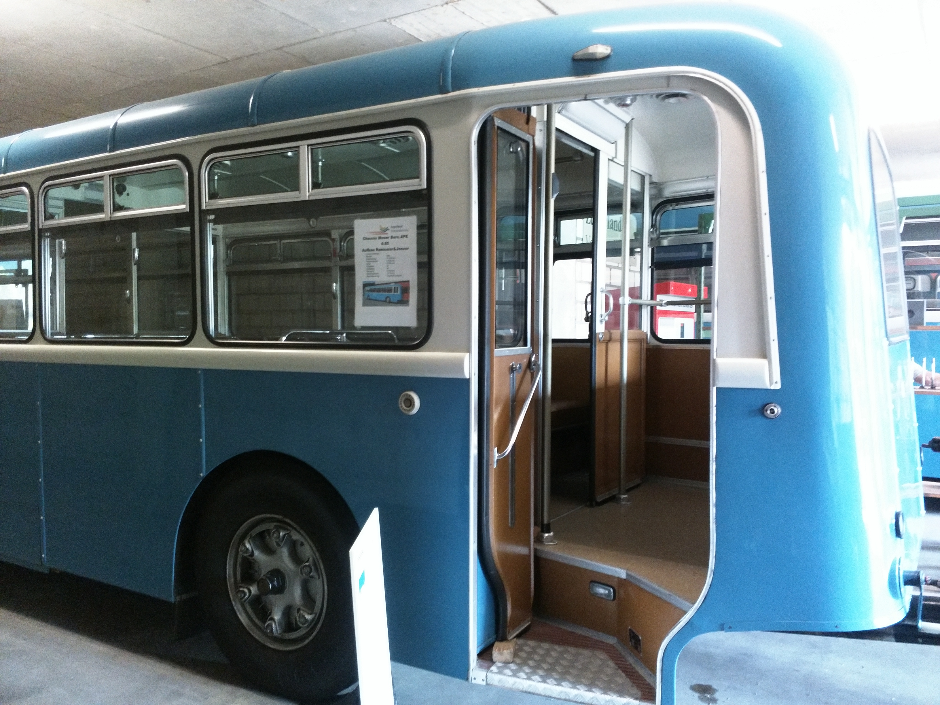 APE 4 80 Personenanhänger ZVB Seite